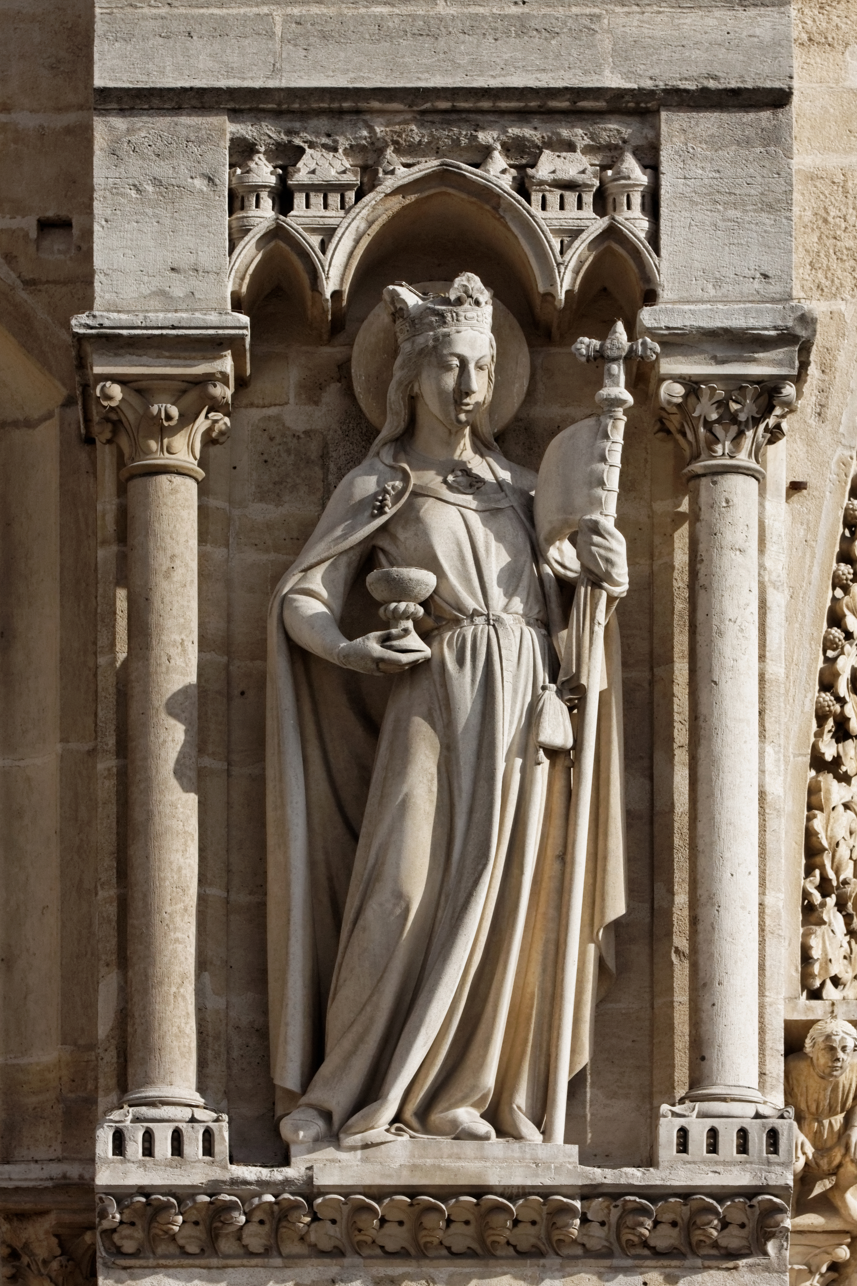 Statue de l'Ecclésia sur un contrefort de la façade ouest de la cathédrale Notre-Dame de Paris.